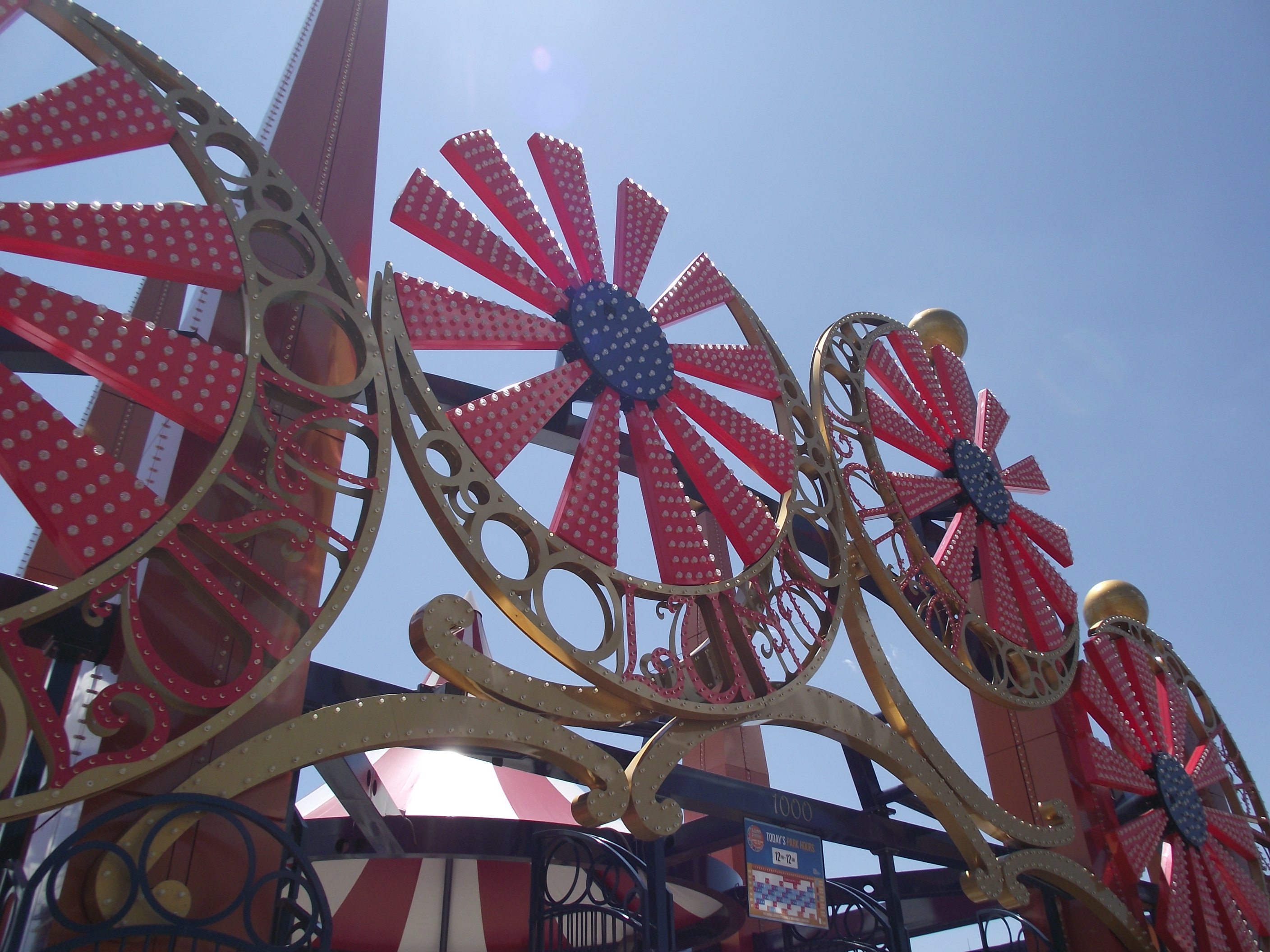 Entrance to Luna Park Coney Island